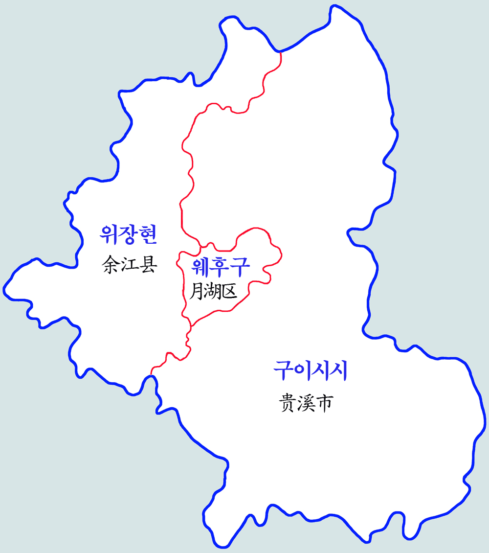 잉탄시 현급구역도